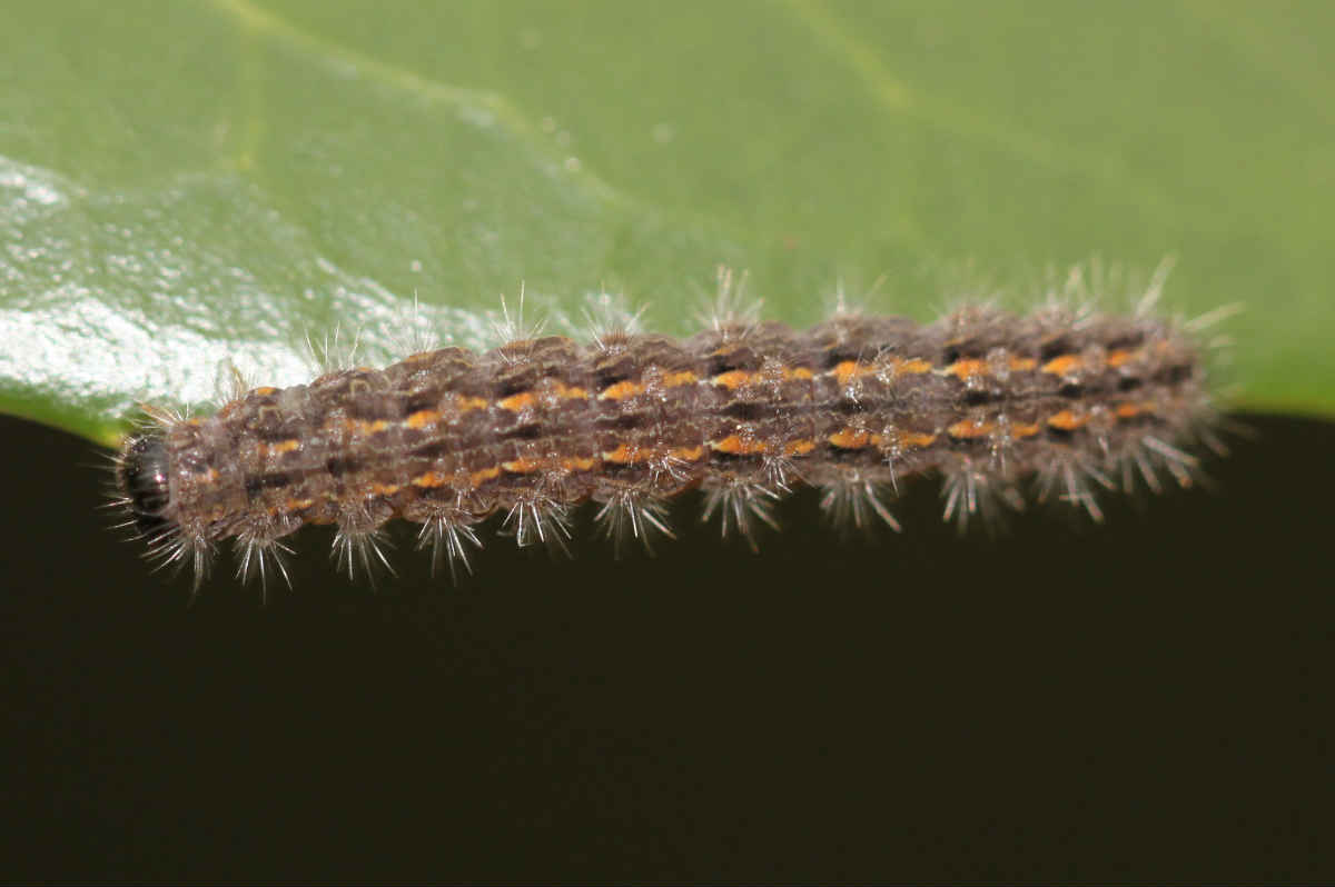 Raupe des Weißgrauen Flechtenbärchens (Eilema caniola), am 22.4.2017 südl. Mannheim